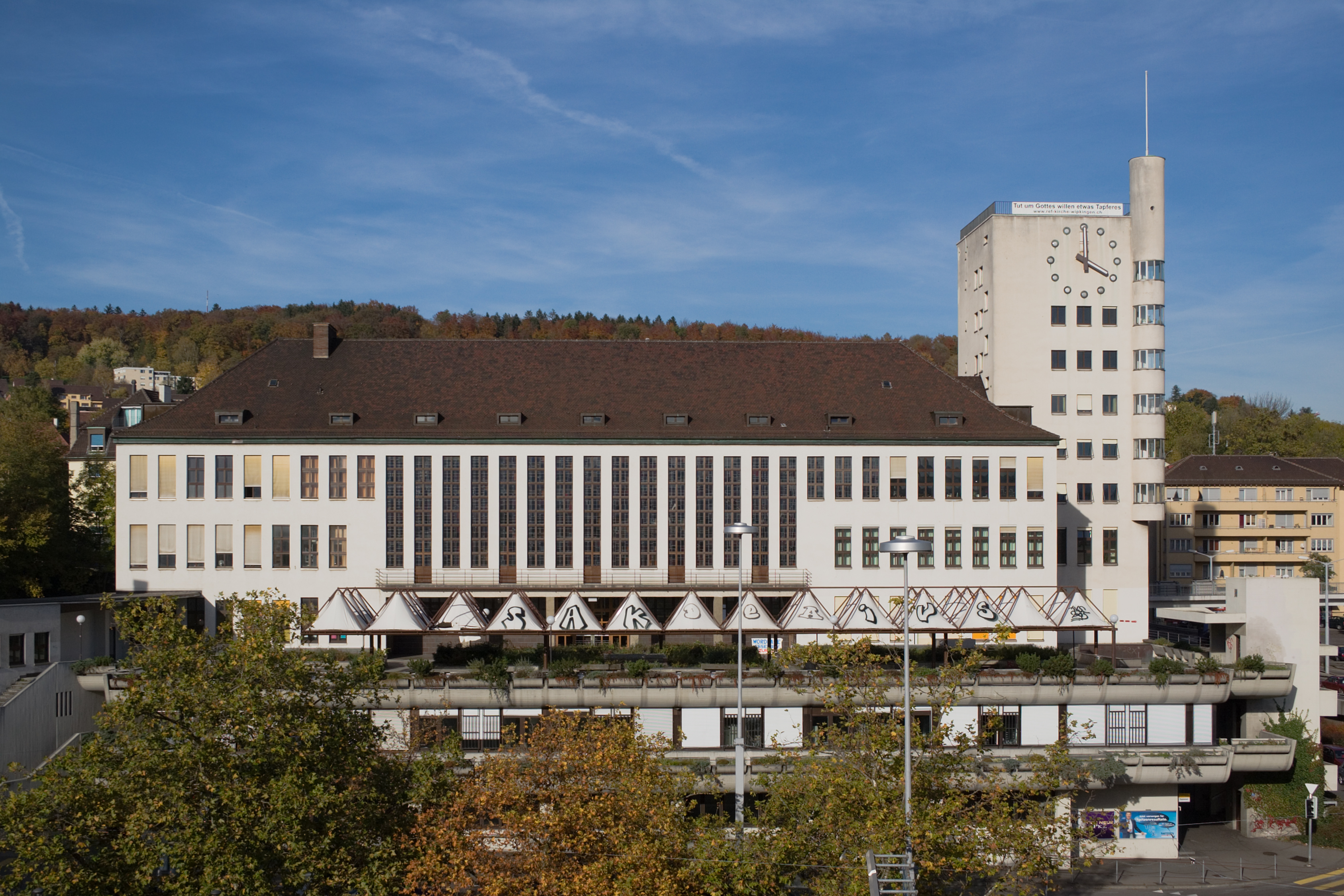 Kirchgemeindehaus Wipkingen, Zürich, Schweiz Erbaut 1930–1932 war das Kirchgemeindehaus von Hans Vogelsanger und Albert Maurer das erste Hochhaus in der Stadt Zürich.